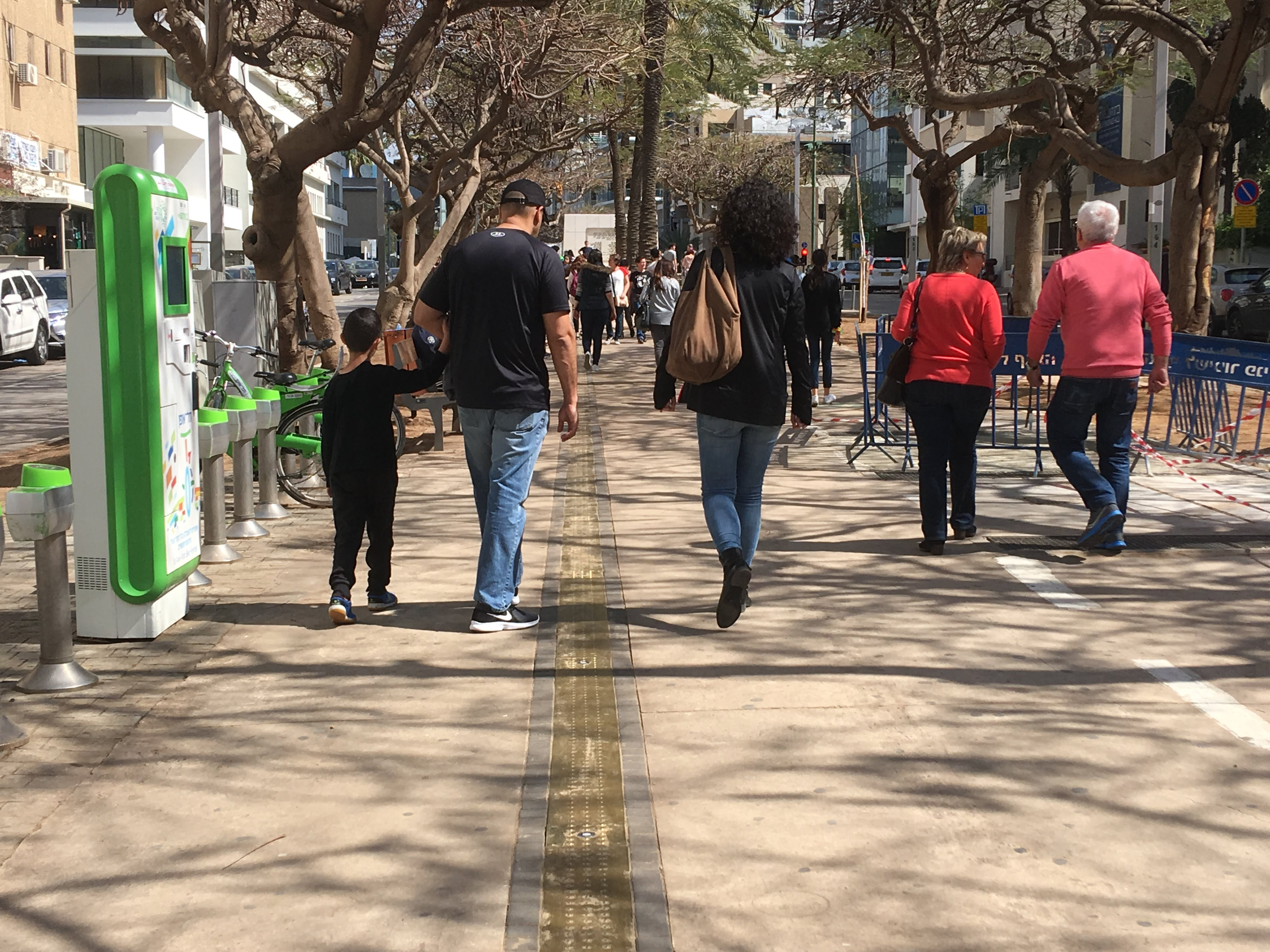 מקטע שביל העצמאות בשדרות רוטשילד, מרץ 2018